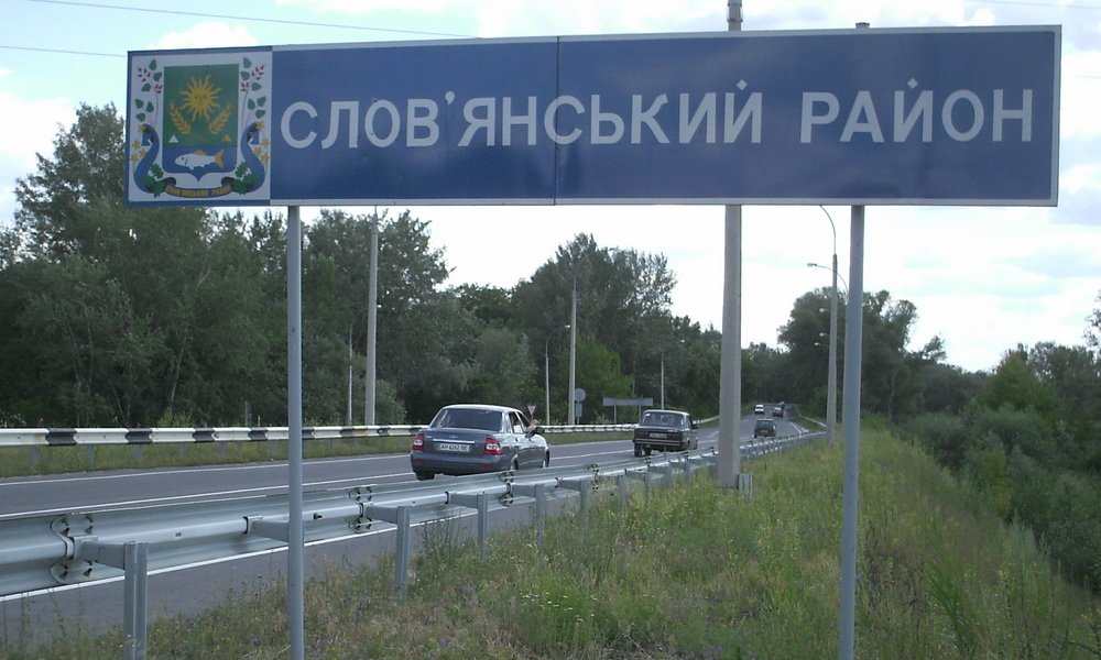 в'їзд до Слов'янського району з Краснолиманського району, на межі по Сіверському Донцю (дорога Красний Лиман - Добропілля)